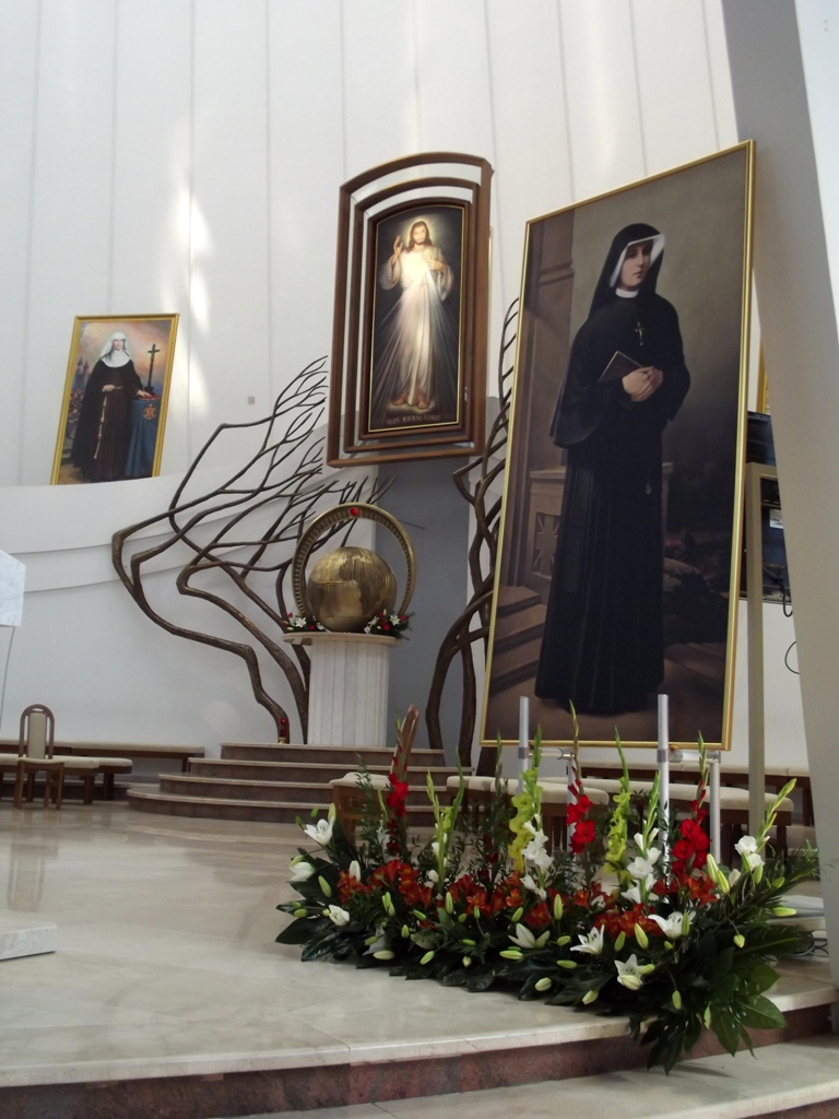 Zdjęcie zrobione podczas wydarzenia w "Rio w Krakowie", w Sanktuarium Bożego Miłosierdzia w Łagiewnikach.